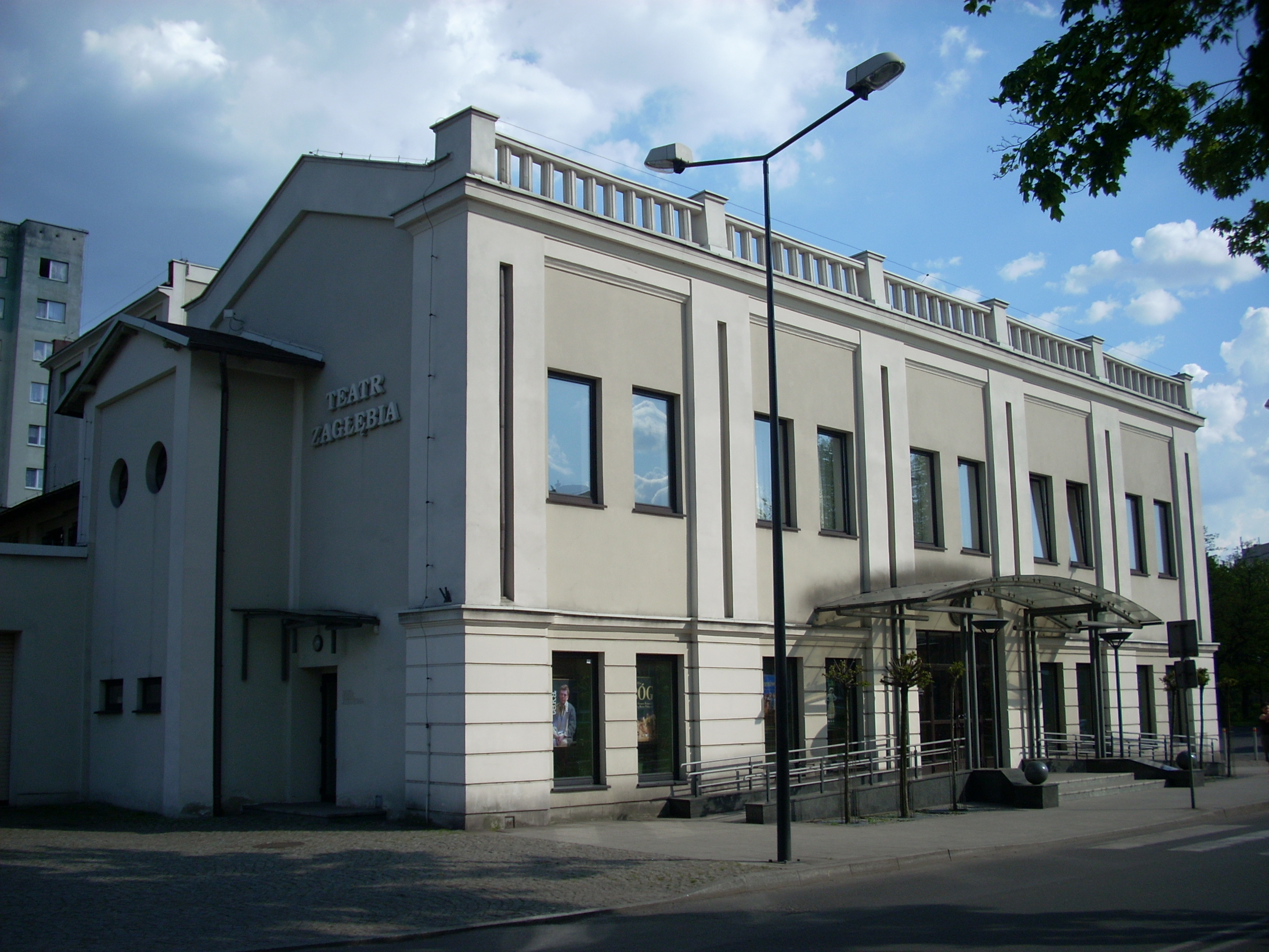 Teatr Zagłębia